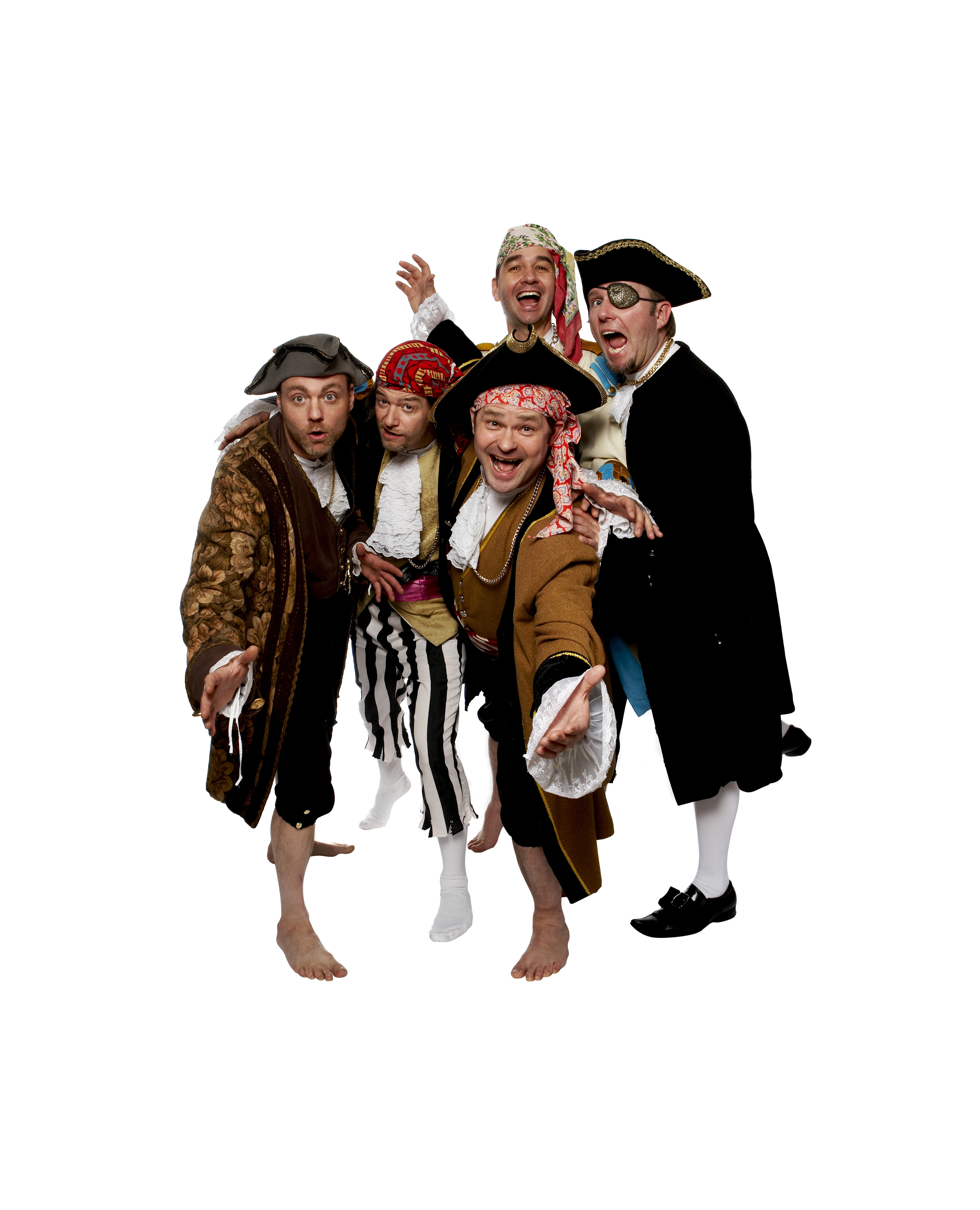 Mek Pek & Habbasutterne 2007